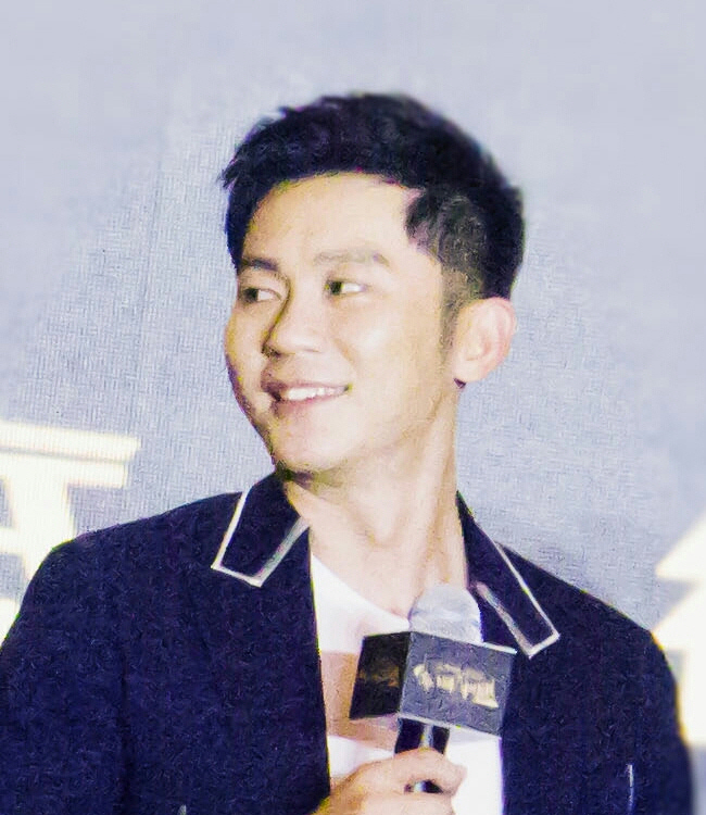 军师联盟发布会 (李晨)